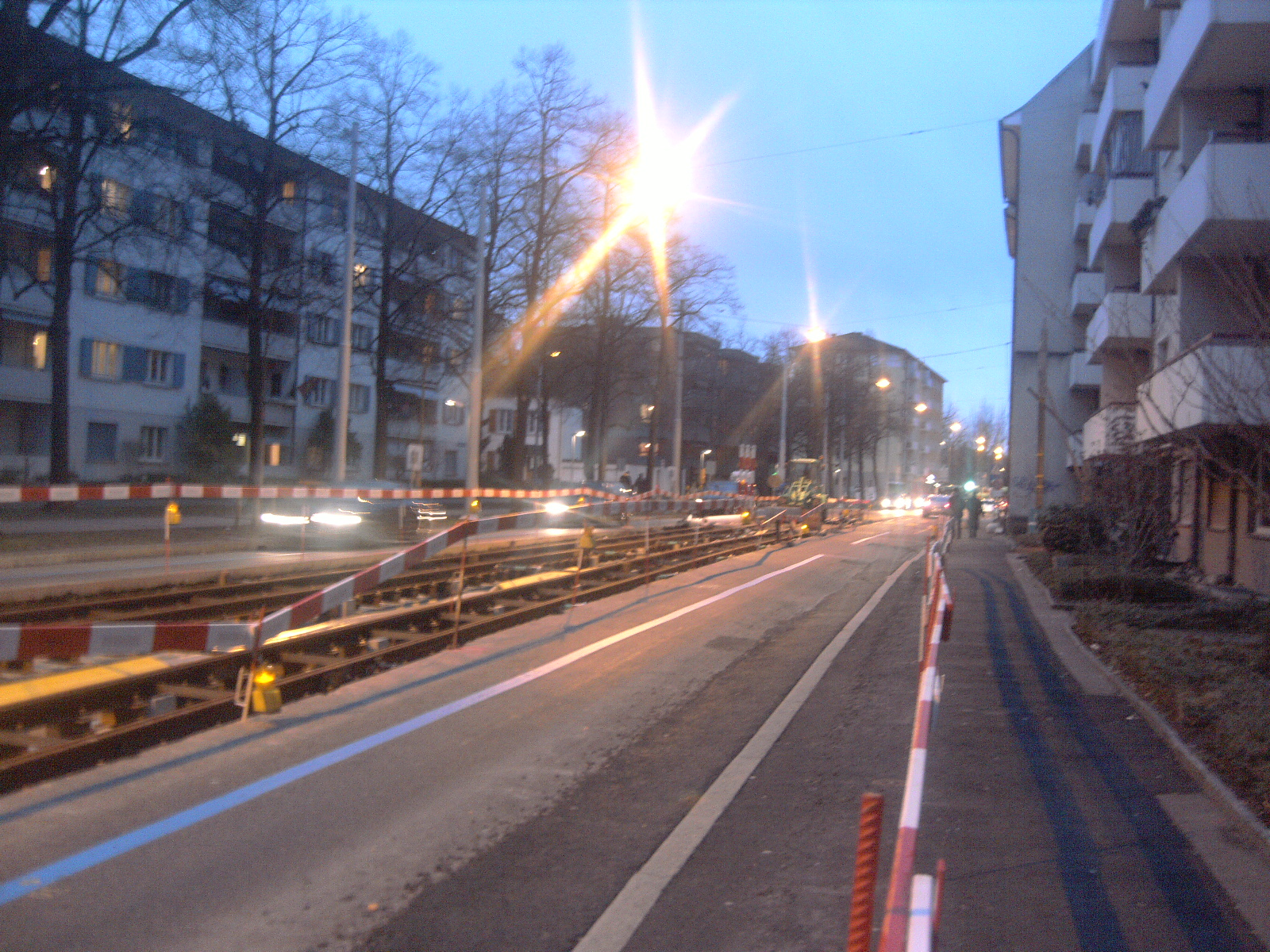 Verlegung der Gleise in die Kleinhüningeranlage für die Verlängerung der Basler Strassenbahn-Linie 8 nach Weil am Rhein (Deutschland)